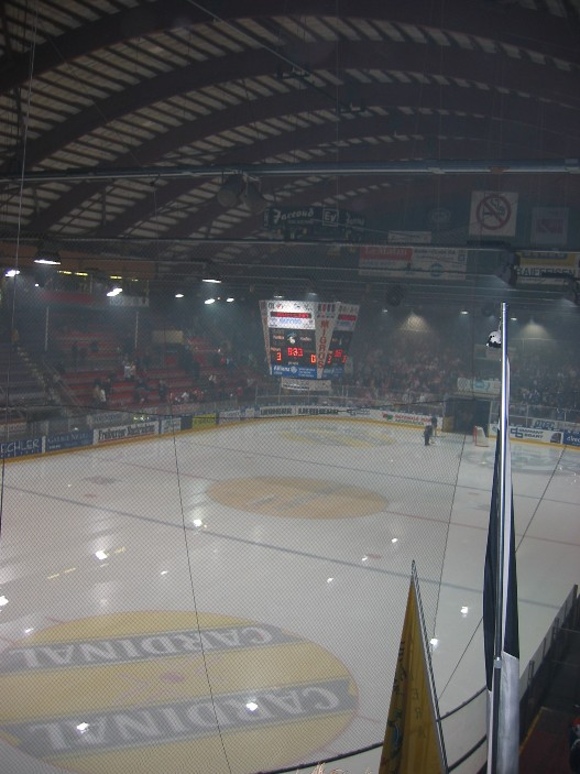 Patinoire de St. Leonard von Innen